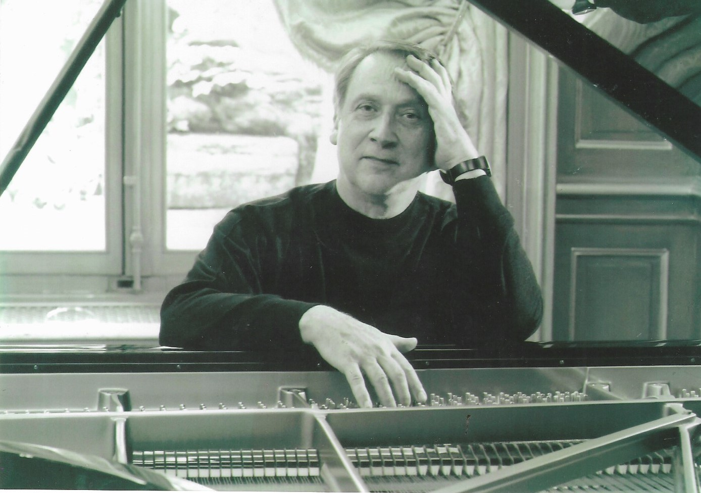 Patrice d'Ollone à l'Ambassade des Pays-Bas à Paris, en 2005